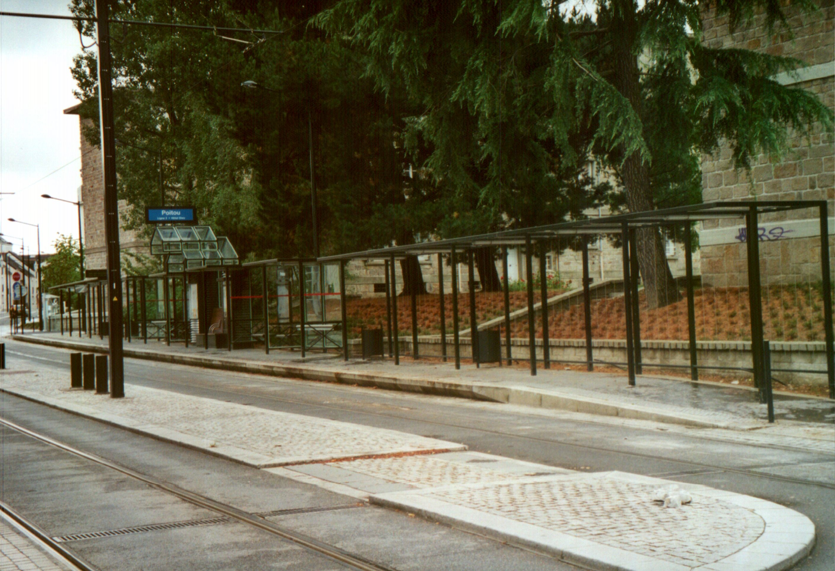 Tramway de Nantes : L'un des quais de la station Poitou (ligne 3) est traité comme une vaste pergola. Cette photo de 2001 montre la station pratiquement à l'ouverture de la ligne, alors que les plantes n'avaient pas encore poussé